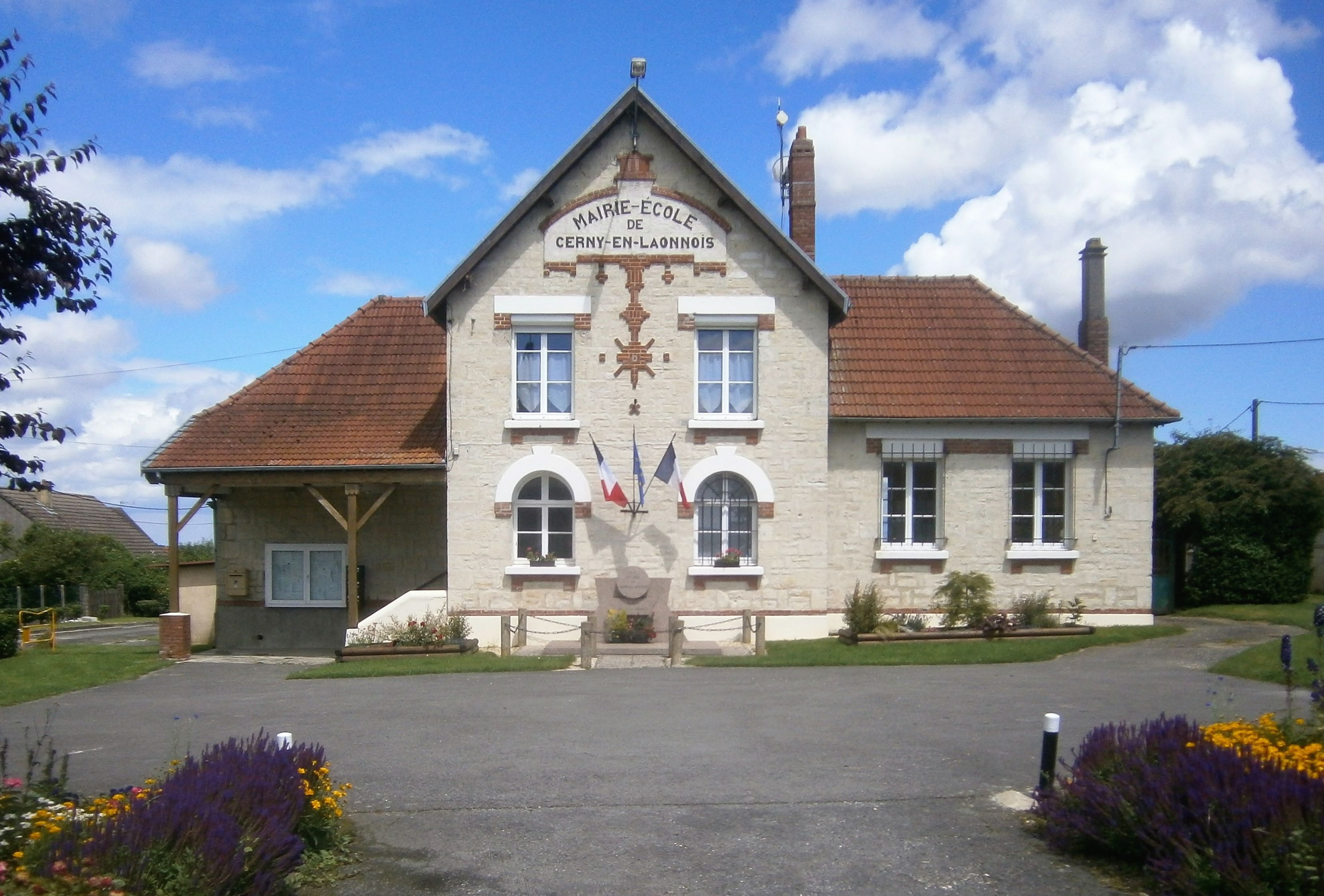 Mairie de Cerny en Laonnois